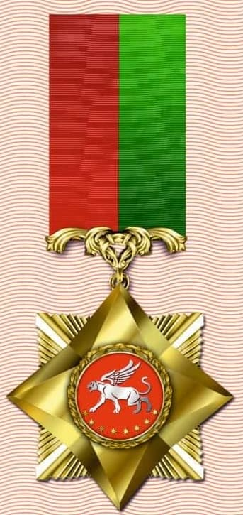 Şərəf ordeninin fotosu